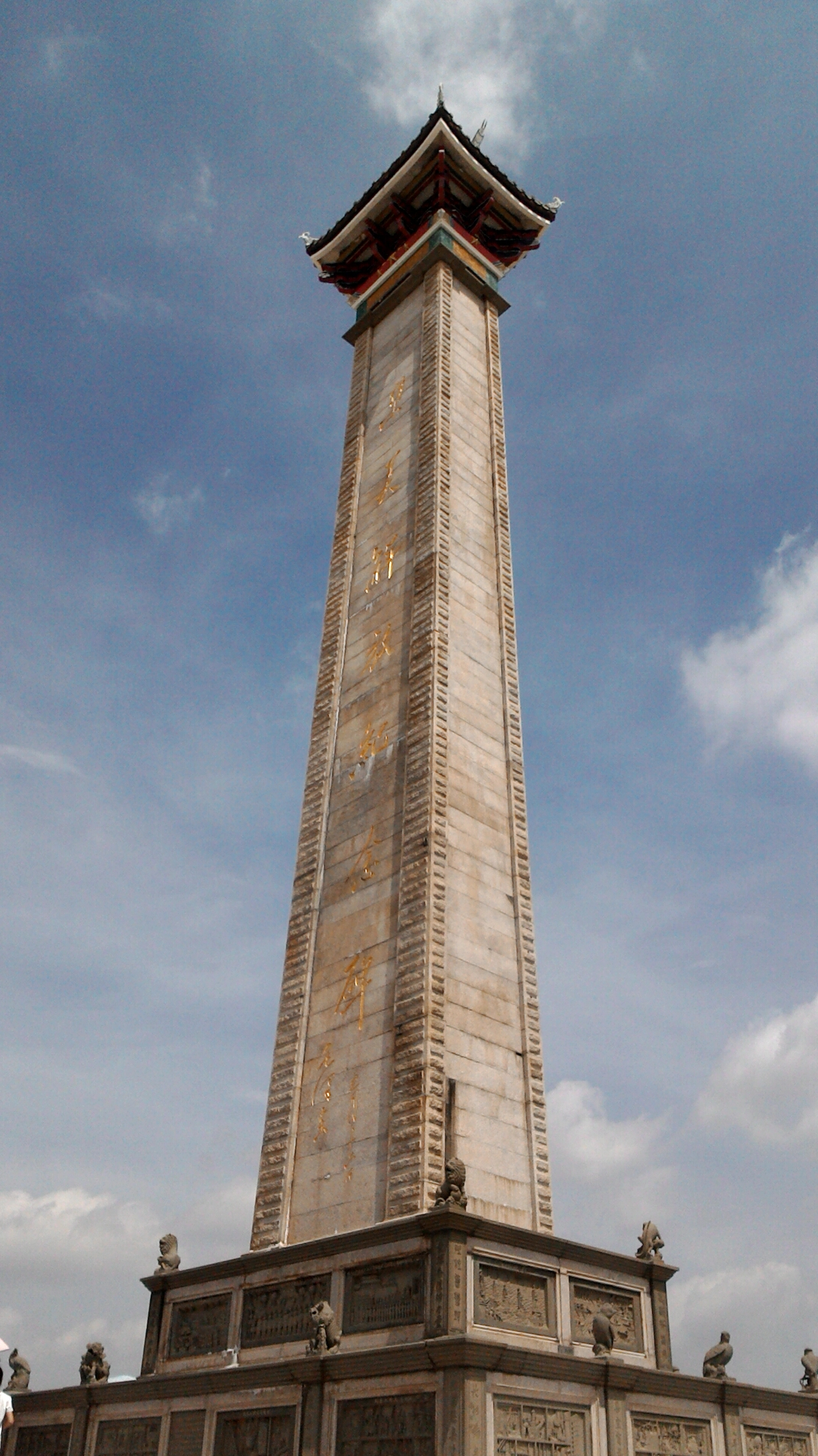 集美解放紀念碑,福建省廈門市集美區集美街道潯江社區